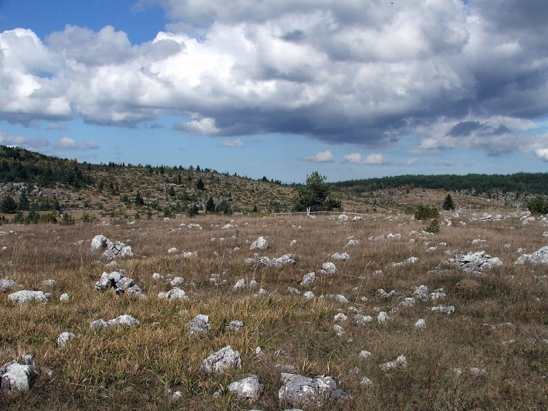 Игор Ирић, -{ }-, -{ -{FujiFilm S5500}- Licensing